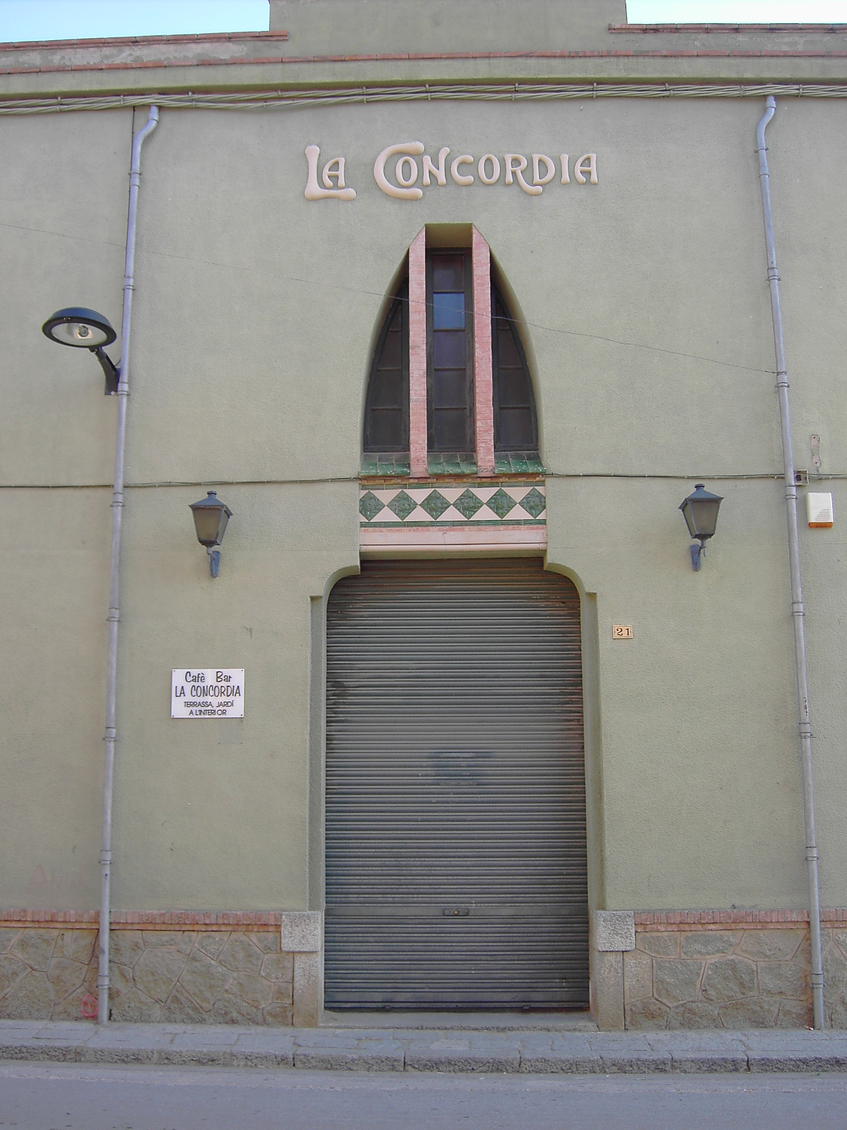 La emblemática nave de La Concordia, hoy reconvertida en Café-Bar, en Agullana (Alto Ampurdán, Gerona).